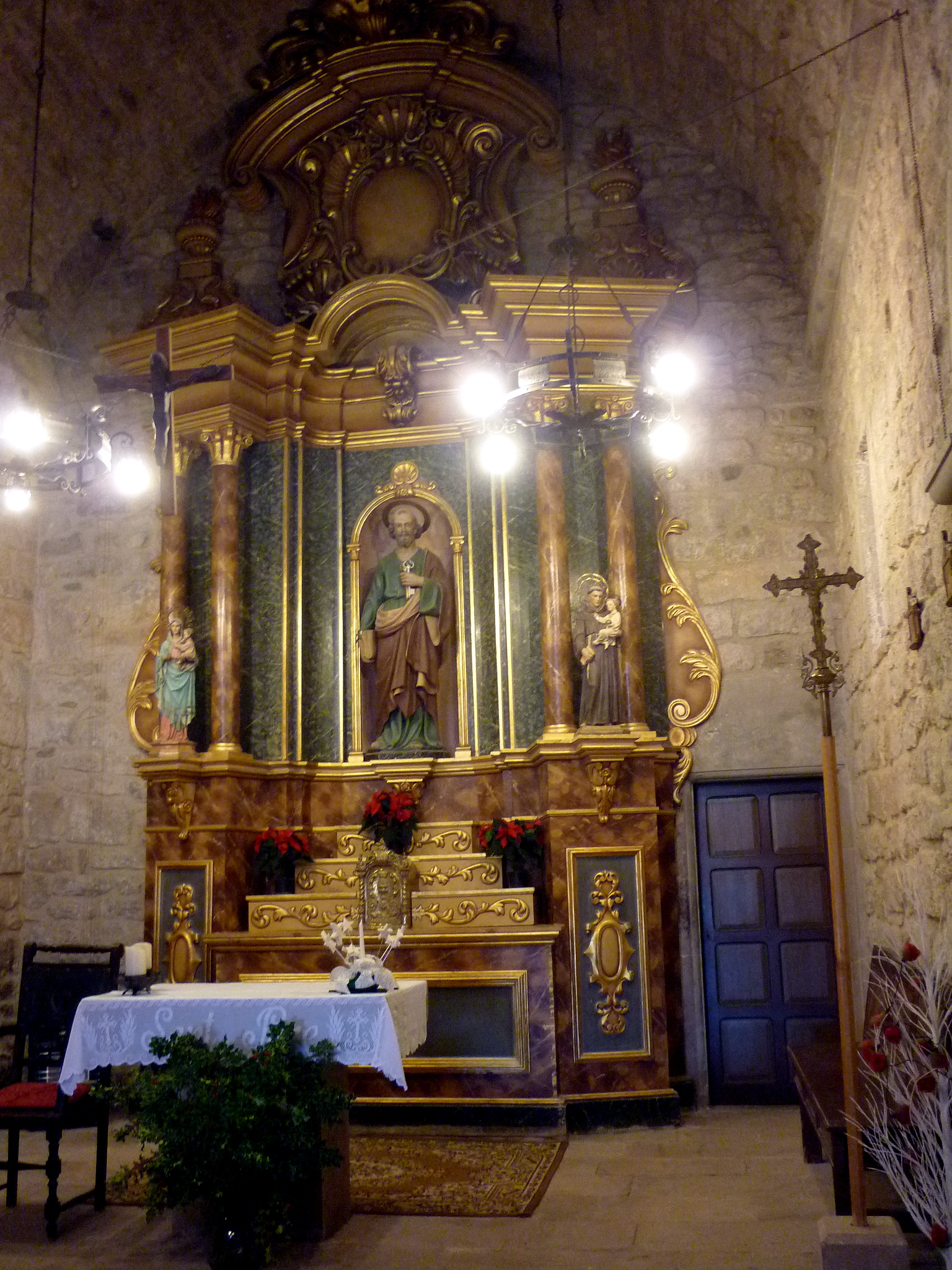 Església de Sant Pere de Castellar (Castellar de la Ribera): altar major